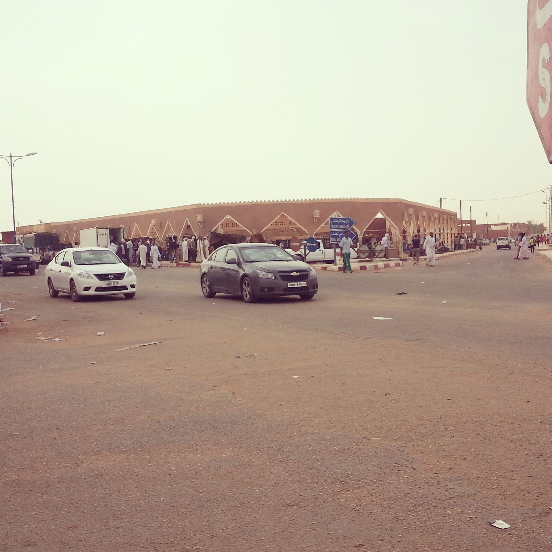 reggane